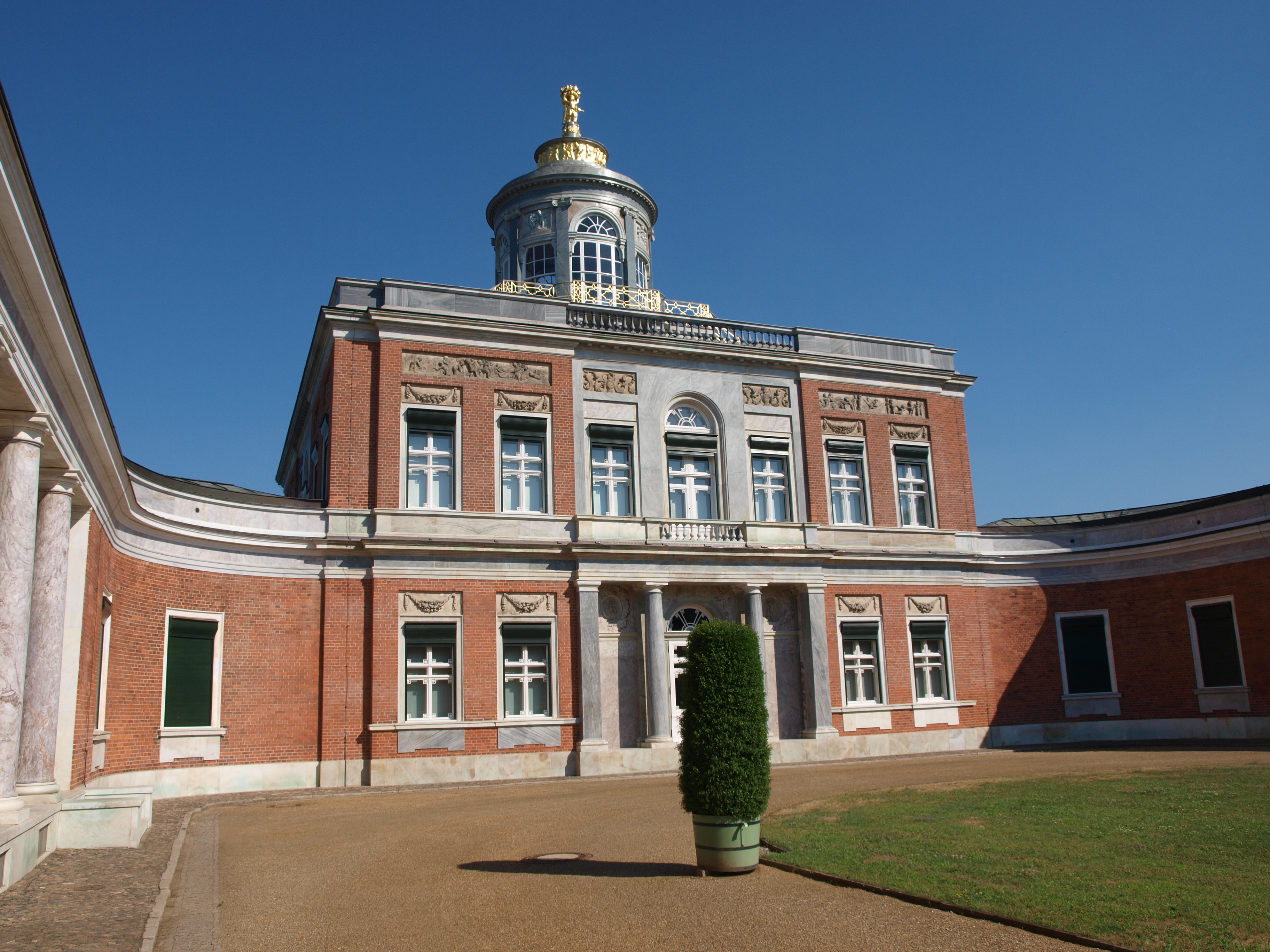 Das Marmorpalais in Potsdam